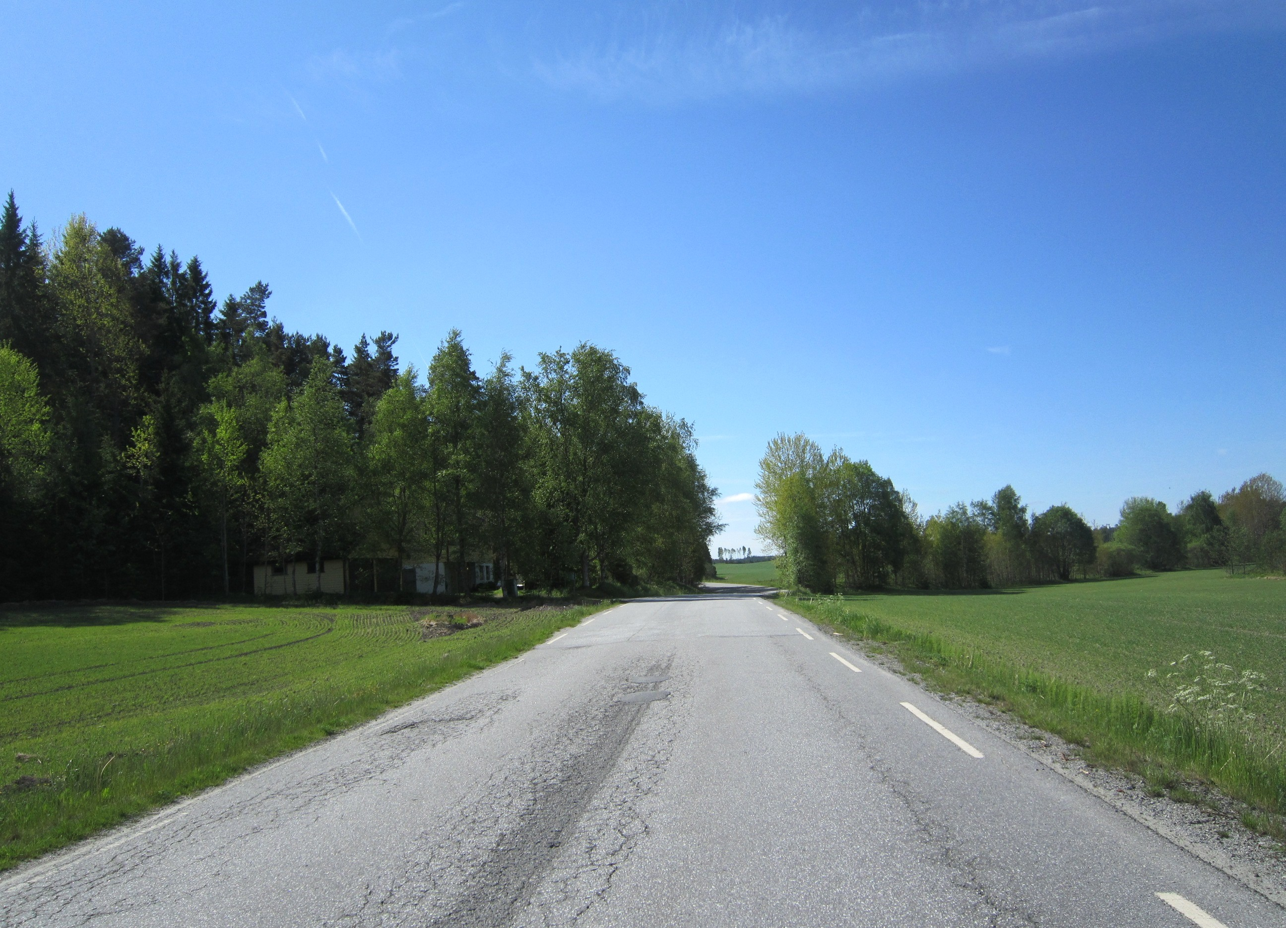 Fylkesvei 864 like sør for krysset med fylkesvei 863